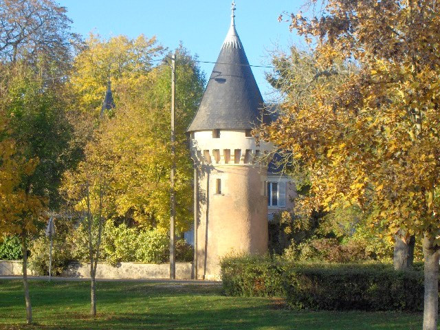 Trouy - Chateau rosé